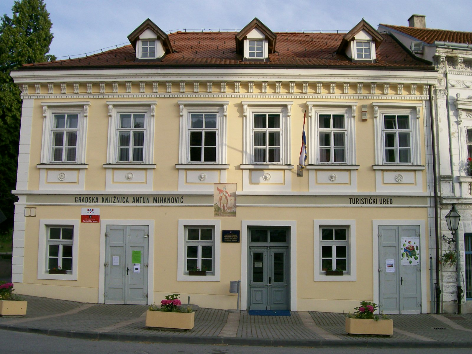 Klanjec - knjižnica, porezna uprava, turistički red. KLANJEC, Trg Antuna Mihanovića 2 - Z-4802